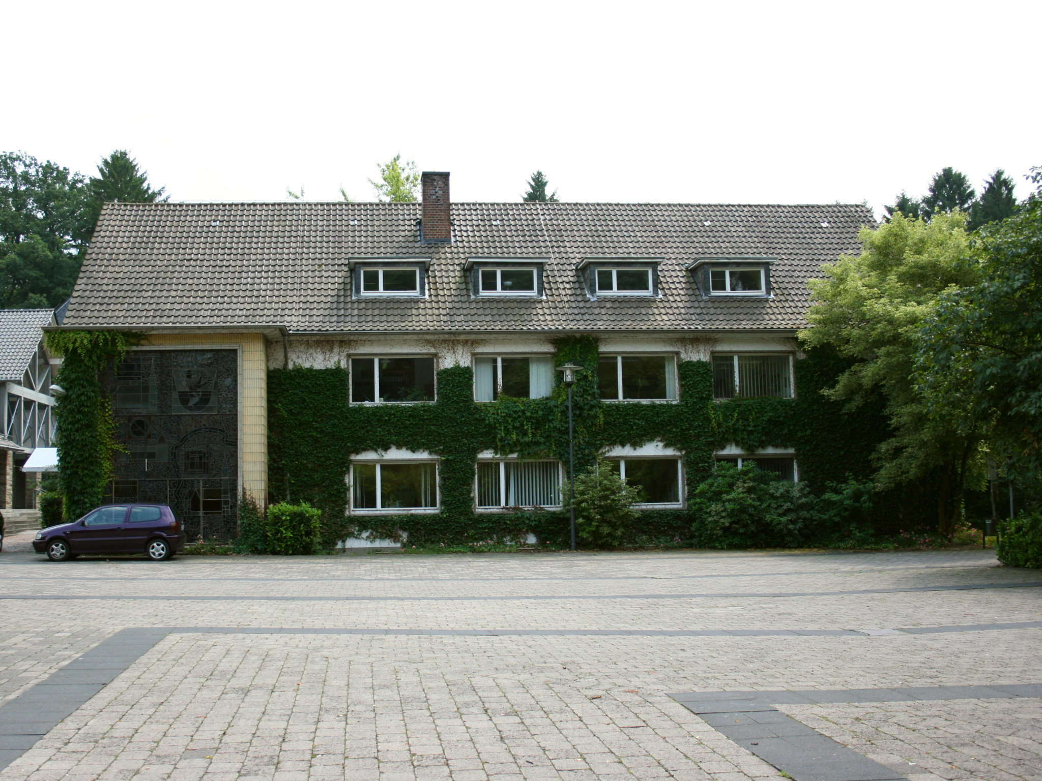 Altes Rathaus in Kürten